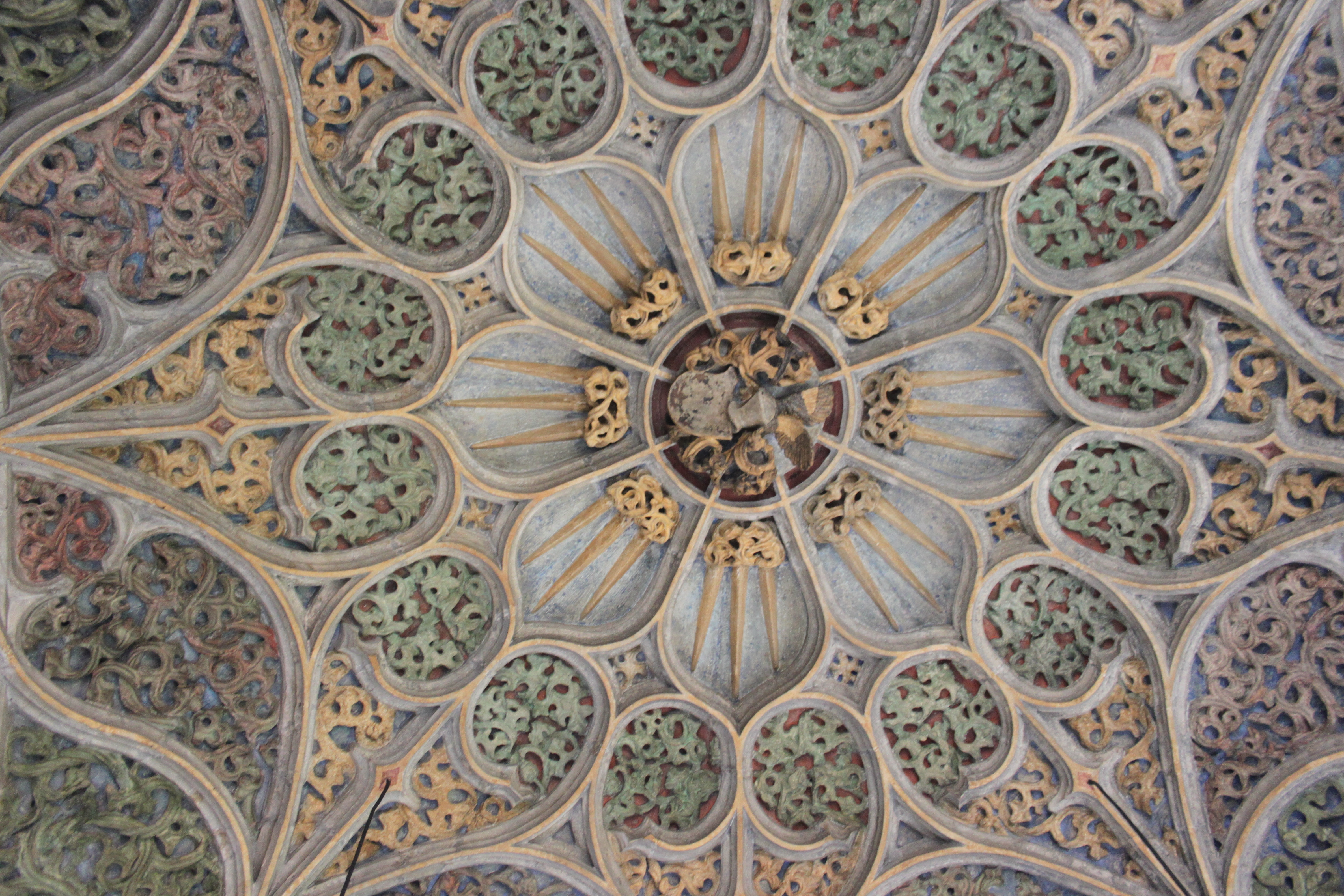 Klenba ve druhém patře věže Sankturinovského domu.